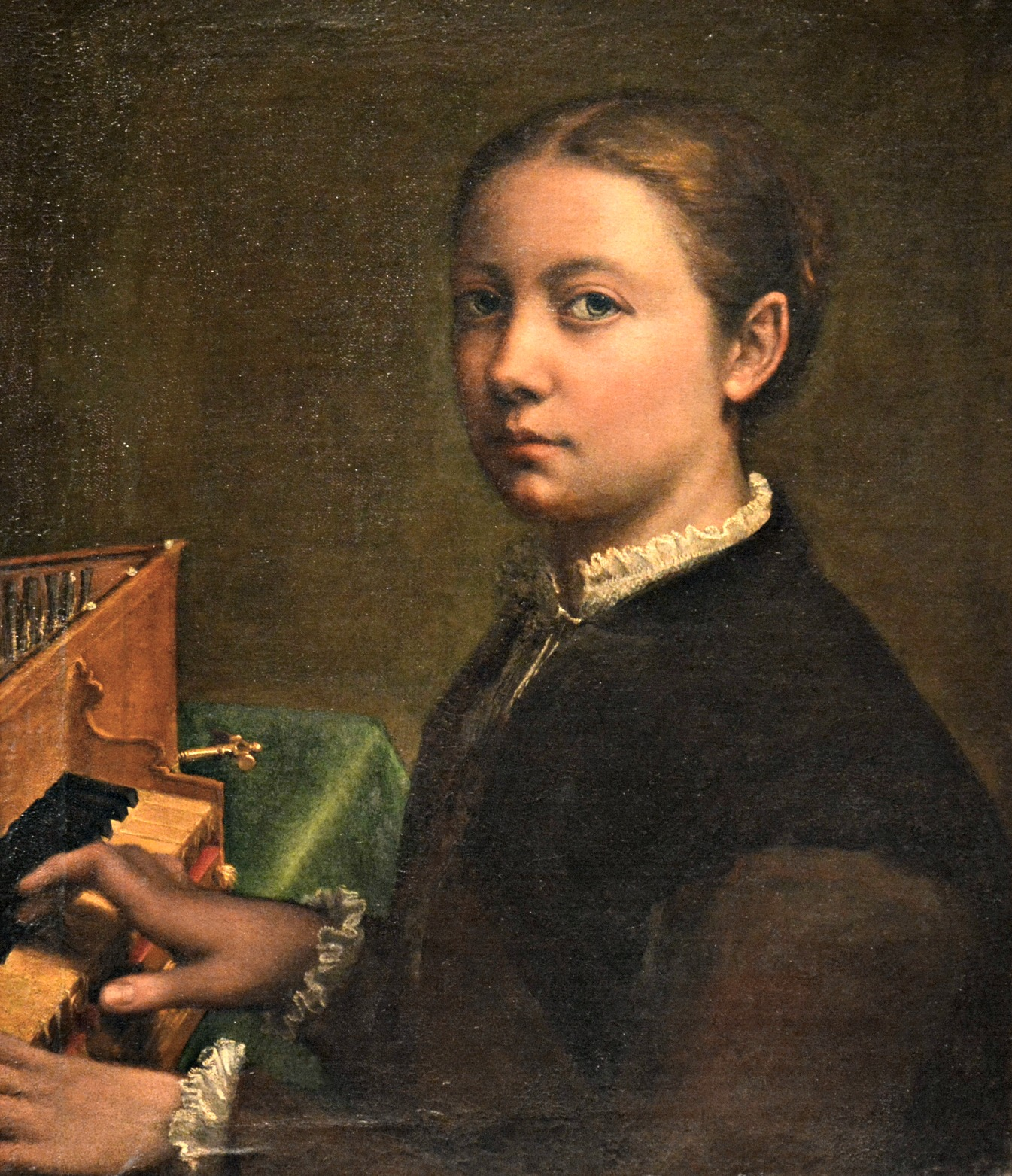 Vedi titolo